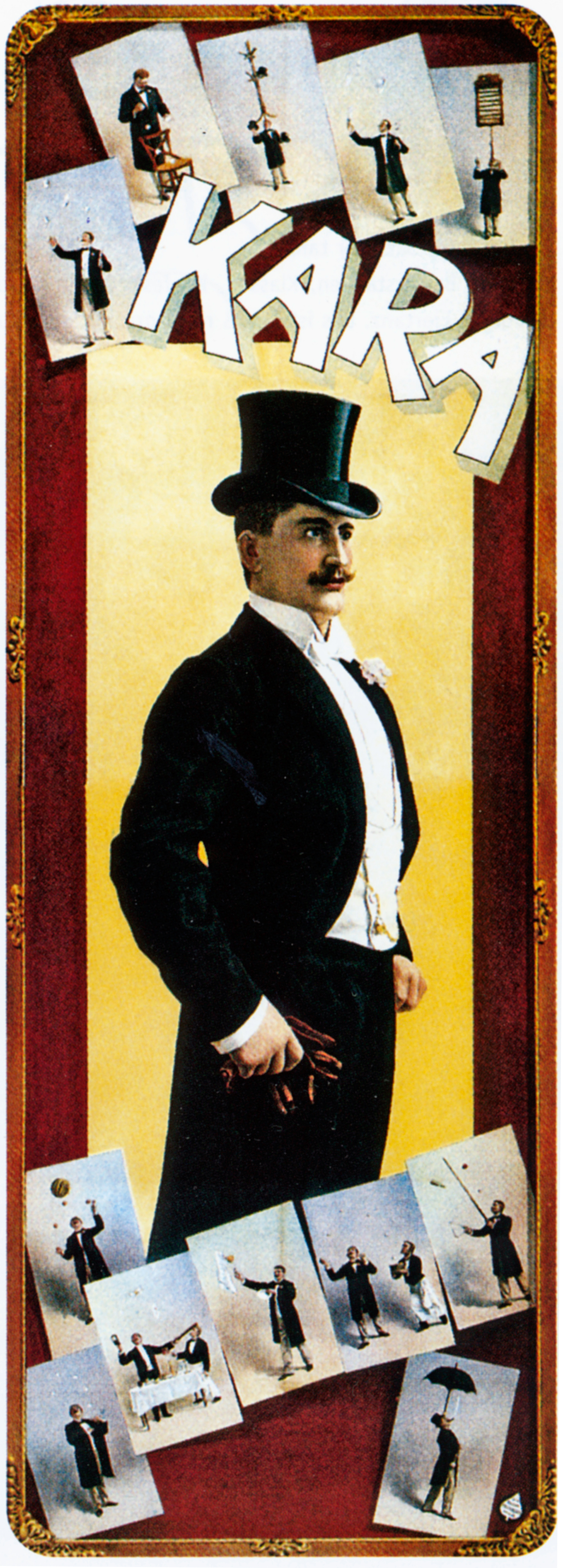 Graz, Varieté Orpheum, Kara, Gentlemanjongleur, Werbeplakat